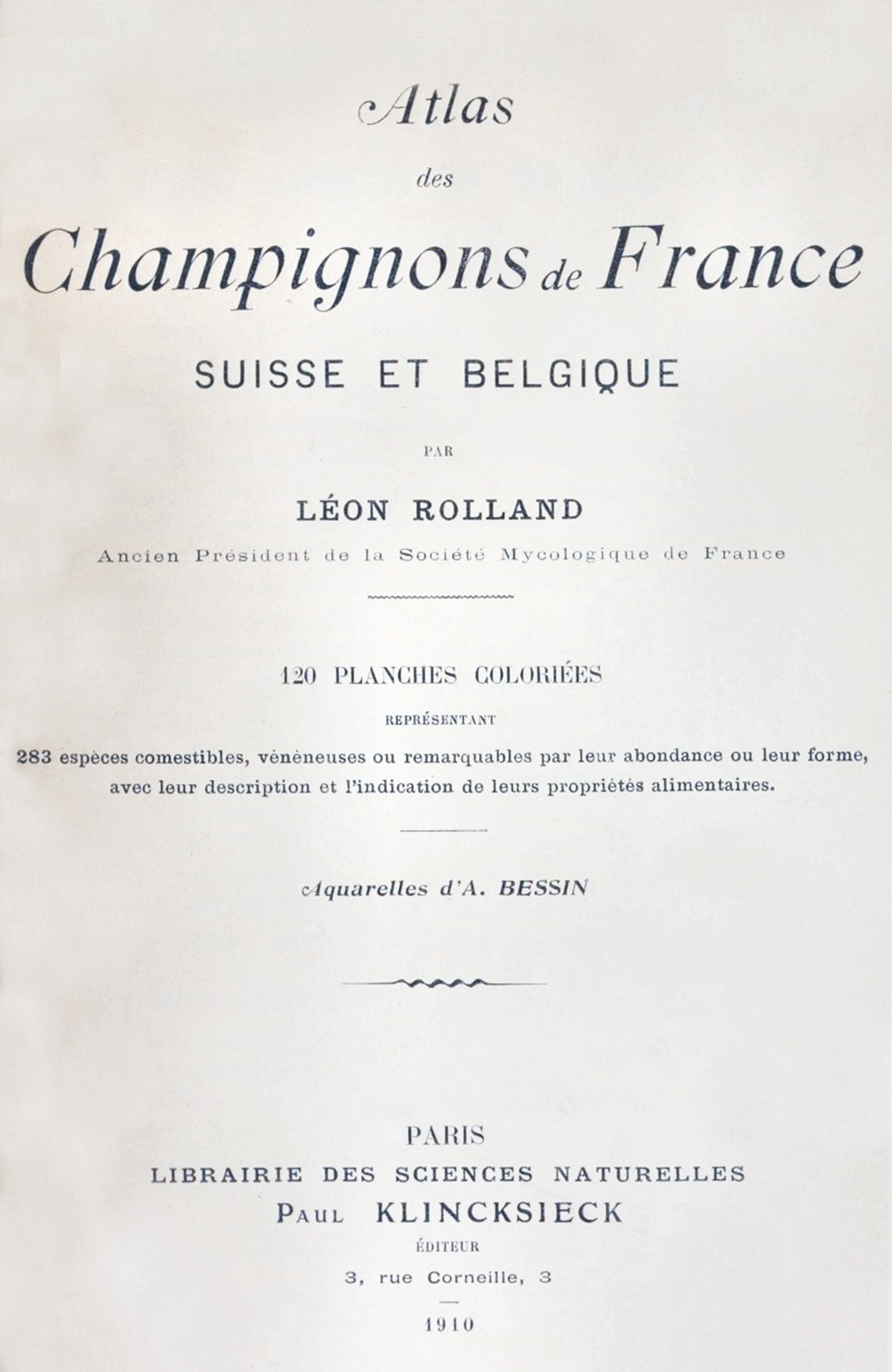 Léon Louis Rolland : Atlas des champignons de France, Suisse et Belgique, Editura Paul Klincksieck, Paris 1910